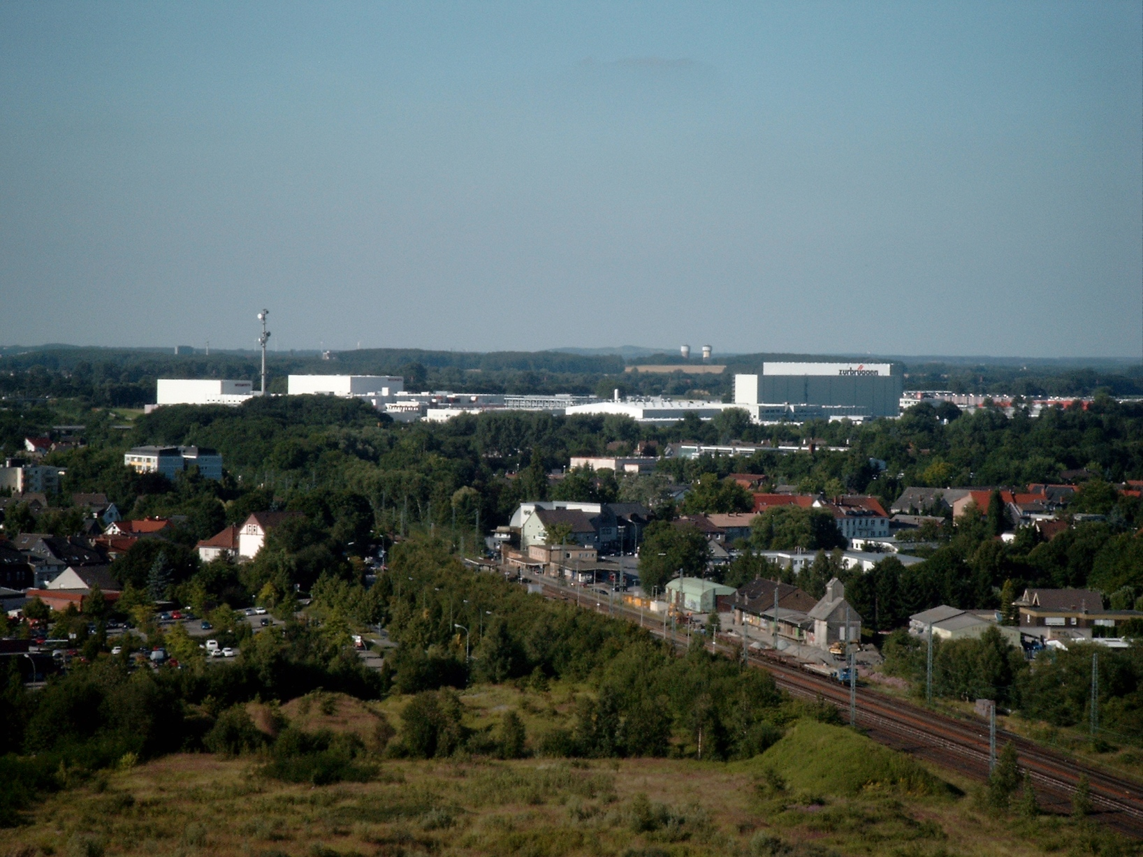 Blick vom Förderturm über Bönen mit seinem Bahnhof und Industriegebiet